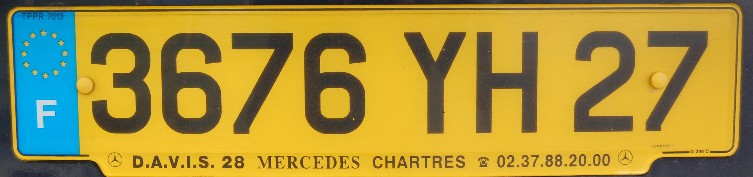 Placa de matrícula da França.